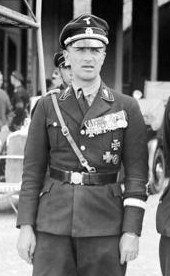 SS. Stabsführer in der Mitte mit Kreuz (X) Prinz Waldeck [Kurt Gildisch X]